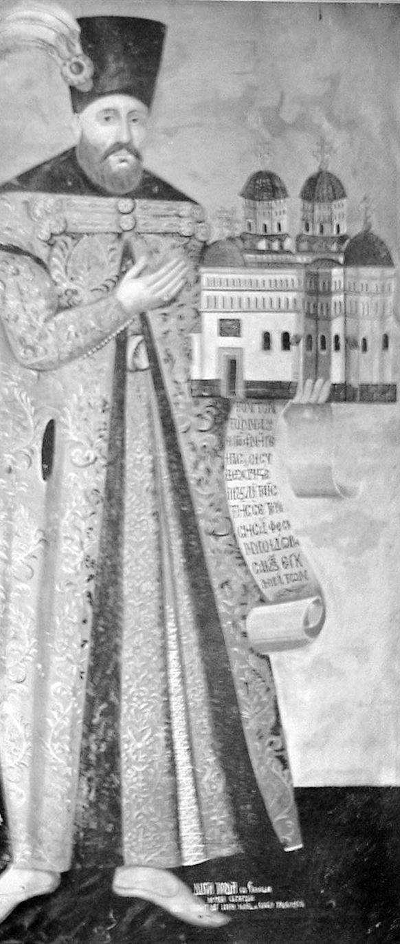 Gheorghe Duca at Cetăţuia monastery